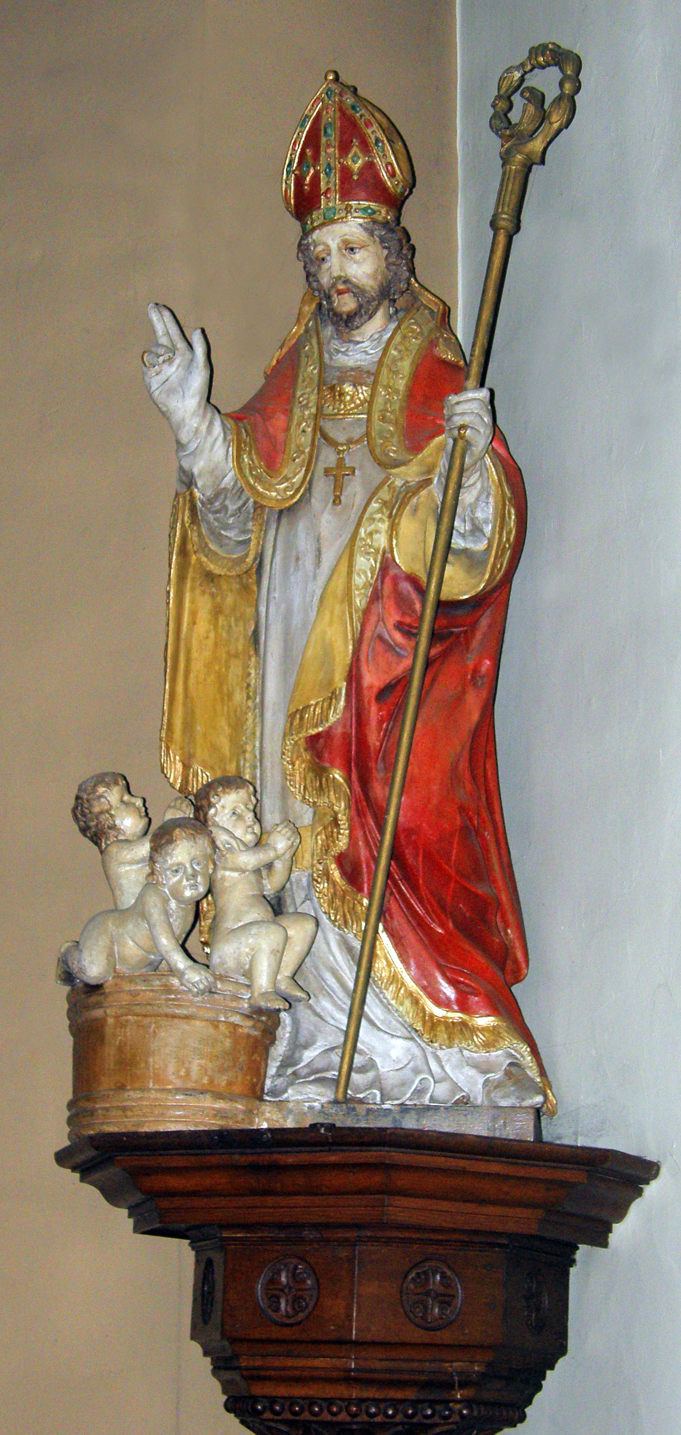 Sujet:Niklos-Statu an der Fielser Kierch Source:Eege Foto vum User:Cornischong